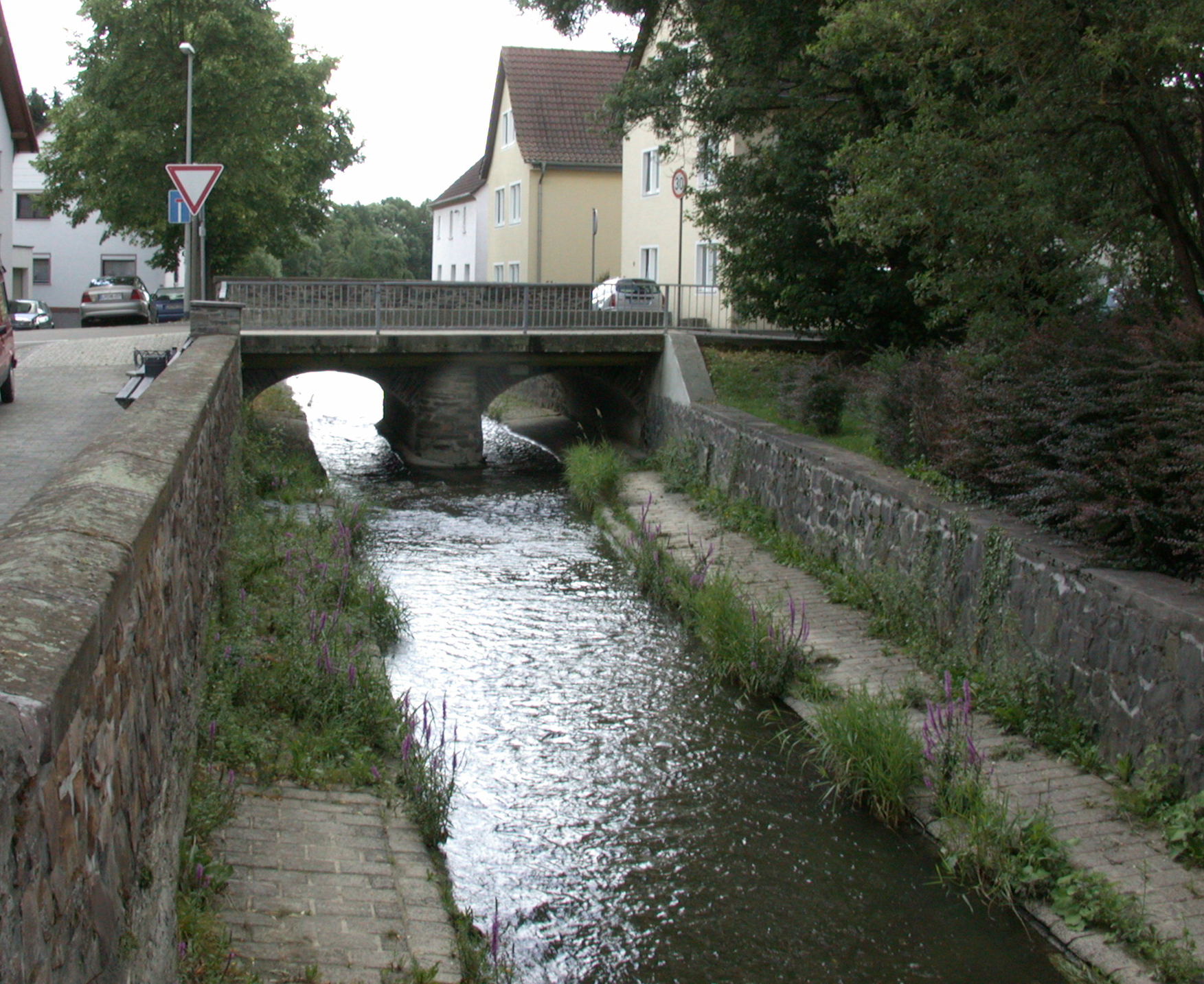 Emsbach, Würges, Bad Camberg, Deutschland